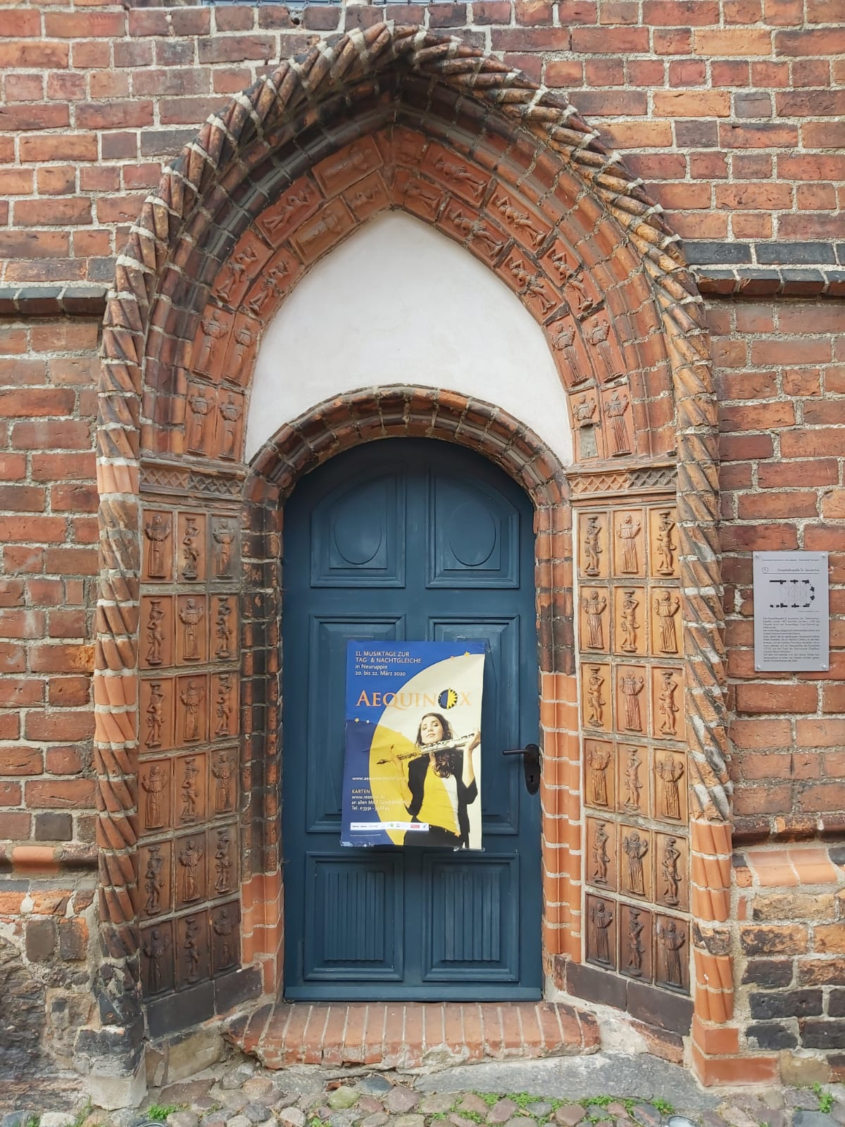 Neuruppin, Land Brandenburg, Hauptportal der Siechenkapelle St. Lazarus eingeschlossen von Tontafeln mit figürlichen Darstellungen (Jesus Christus an der Martersäule und der hl. Franziskus).